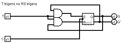 RStoD